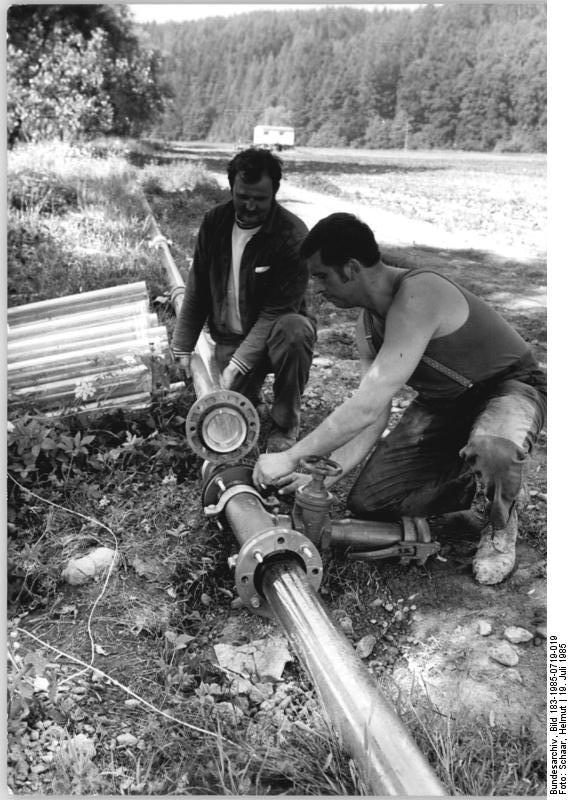 Gräfinau-Angstedt, Aufbau einer Beregnungsanlage ADN-ZB Schaar 19.7.85 Bez. Suhl: Rohre aus Glas, hergestellt im Kombinat Technisches Glas Ilmenau, werden in der LPG Pflanzenproduktion Gräfinau-Angstedt genutzt. Bernd Sauerbrey und Thomas Schwarz von der Meliorationsbrigade der LPG verlegen die neuen Rohre an den Beregnungsanlagen. Die Genossenschaft bewässert auf diese Art bereits rund 40 ha Erdbeer-, Gemüse- und Hackfruchtkulturen. Die Erprobung des neuen Erzeugnisses in der Landwirtschaft ist bisher einmalig. (siehe 18N)